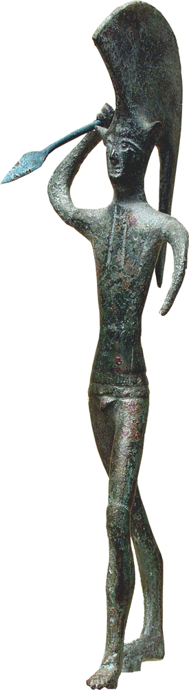 Perugia, Museo Archeologico Nazionale dell'Umbria, Statuetta votiva in bronzo, raffigurante Marte in assalto da Ancarano di Norcia; V sec. a.C.